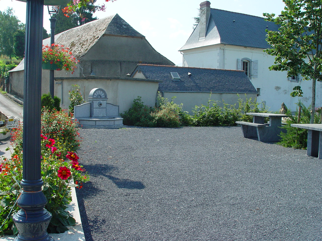 Place de la fontaine ou place de Candaouan à Bourréac. Place fleurie créée en 2005